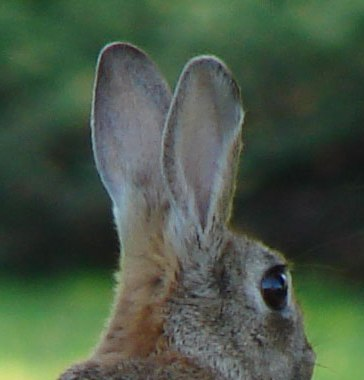 Conejo desconocido, averiguando a que tipo de familia pertenece - detail